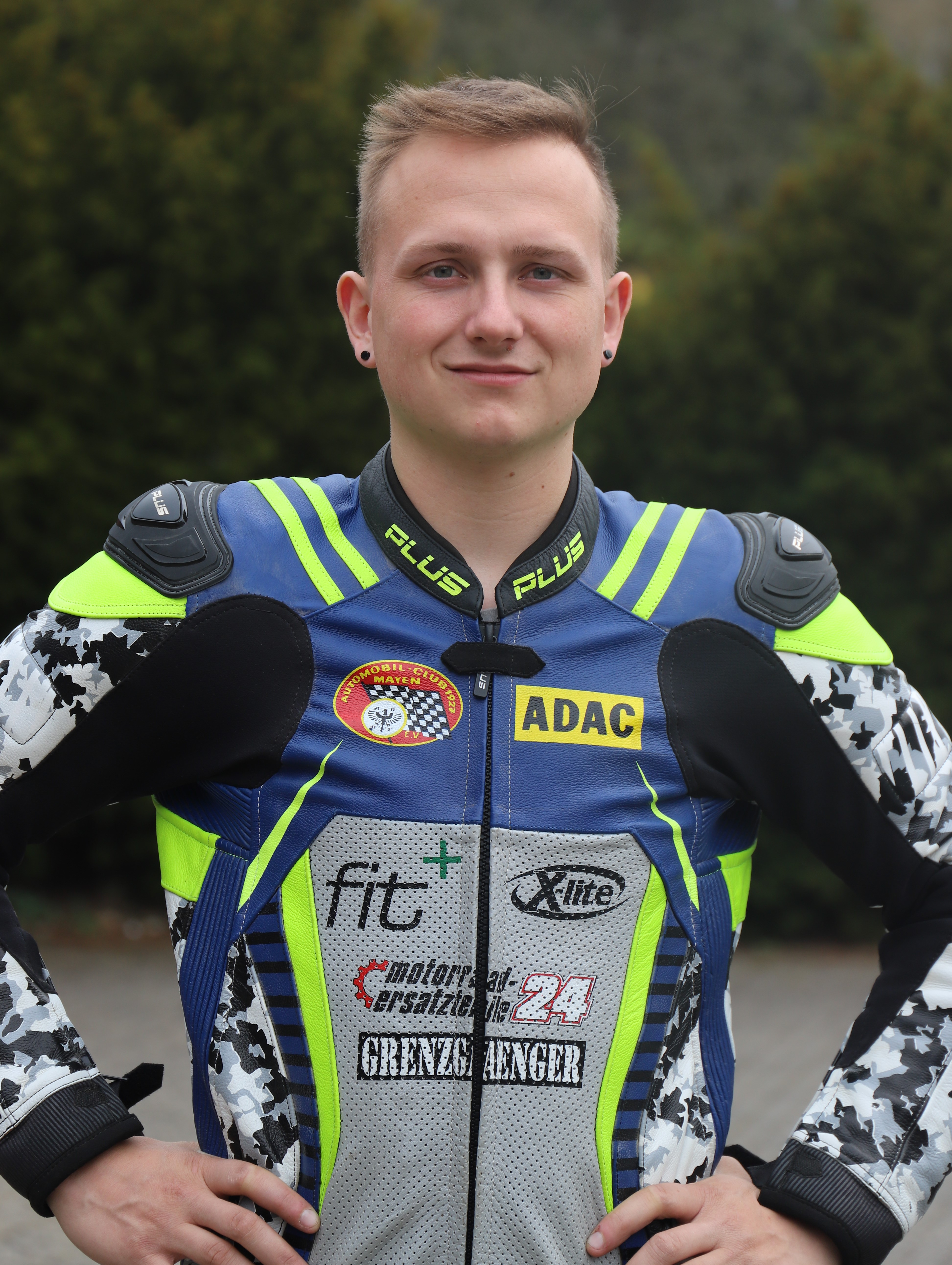 Porträt